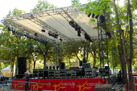 Empot Grand 2004